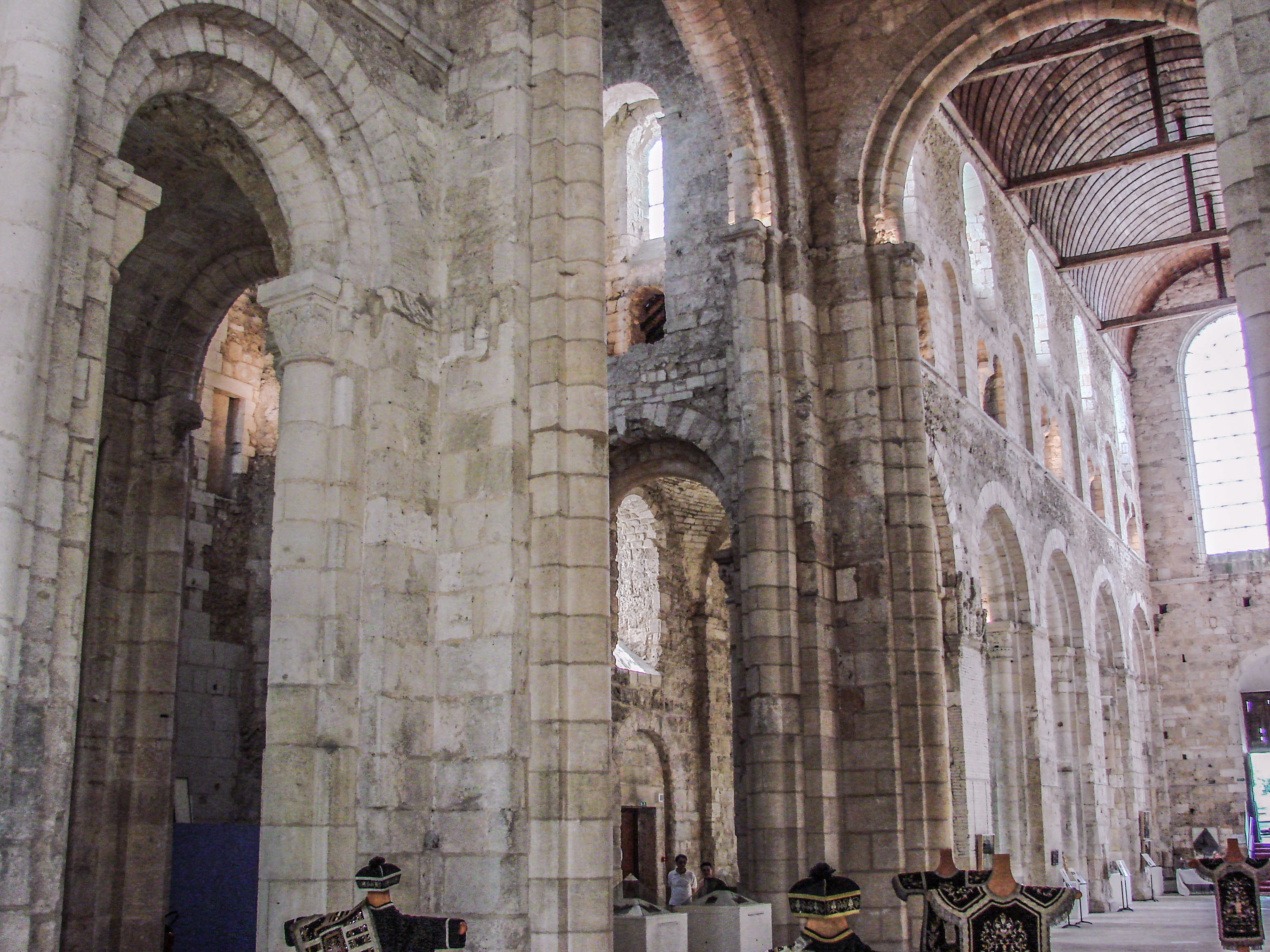 Abbatiale Notre-Dame de Bernay (Eure), croisée du transept